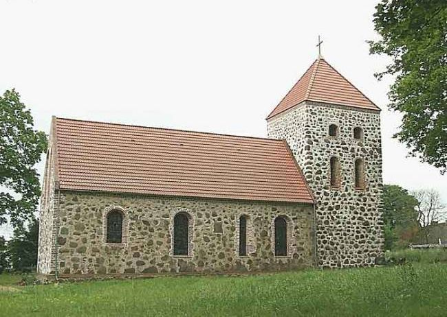 Steklno - rzymskokatolicki kościół filialny p.w. św. Krzysztofa (decyzja ruina), kon. XIII, pocz. XVIII (Autorem jest ksiądz Sławomir Pawlak. Zdjęcie zostało wykonane w 2002 roku)